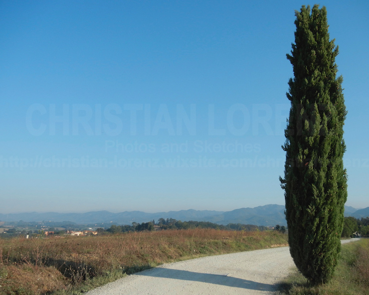 Il caratteristico Cipresso di Montelleri, frazione nei pressi del Lago di Vicchio.